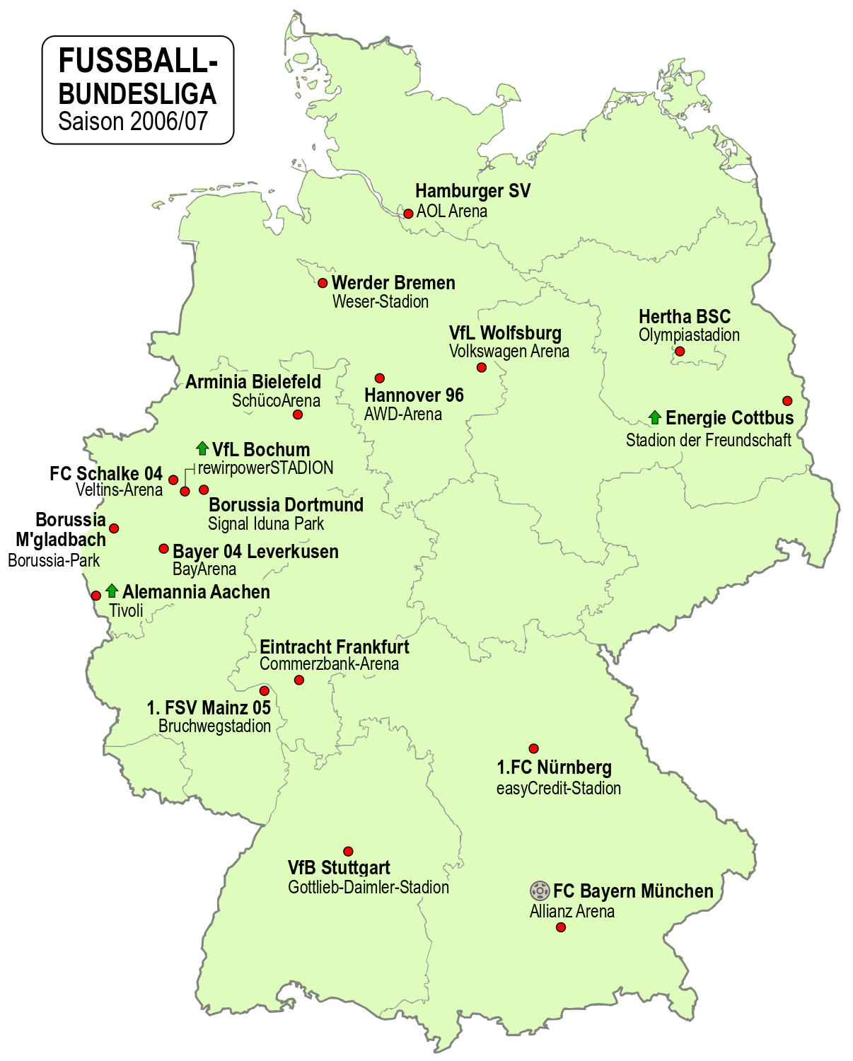 Karte der Vereine der Fussball-Bundesliga-Saison 2006/07